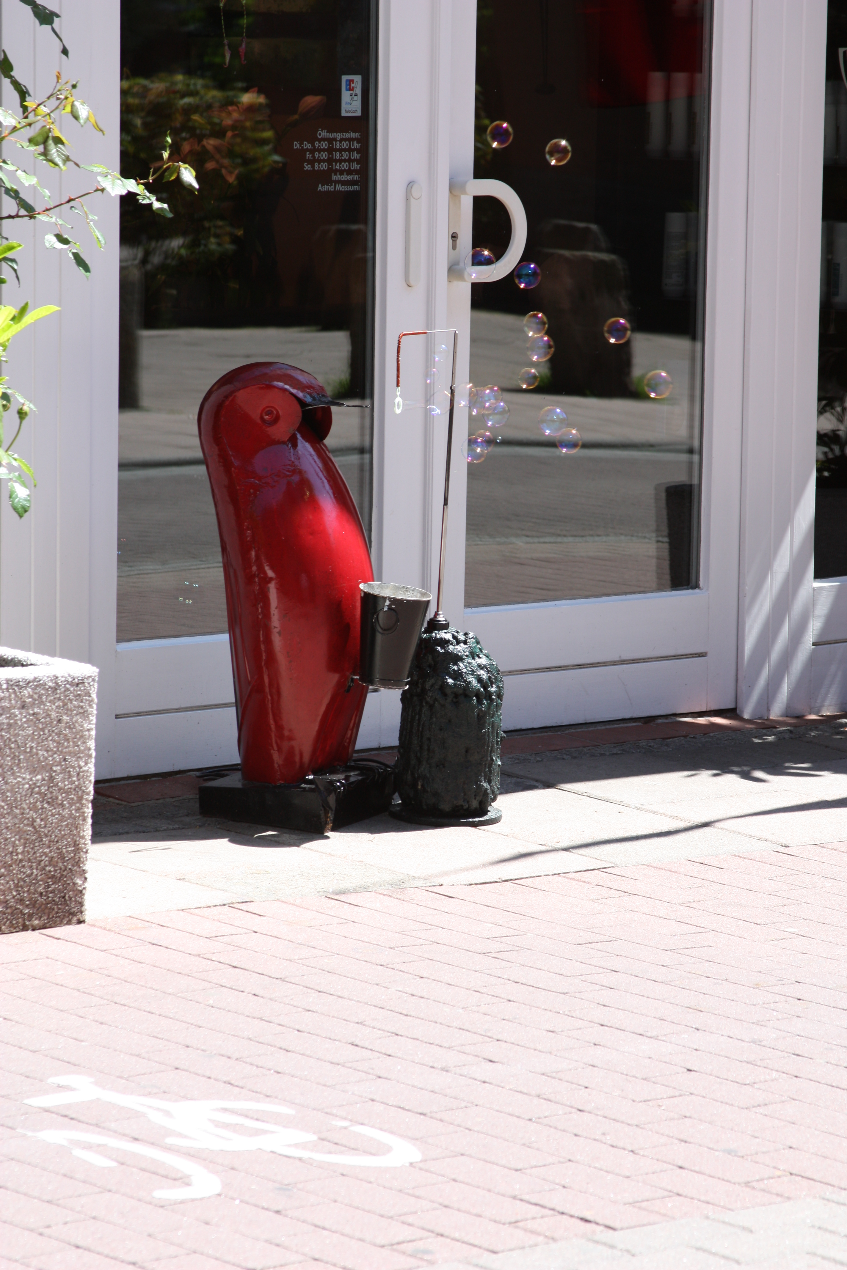 Seifenblasenmaschine in Lüneburg